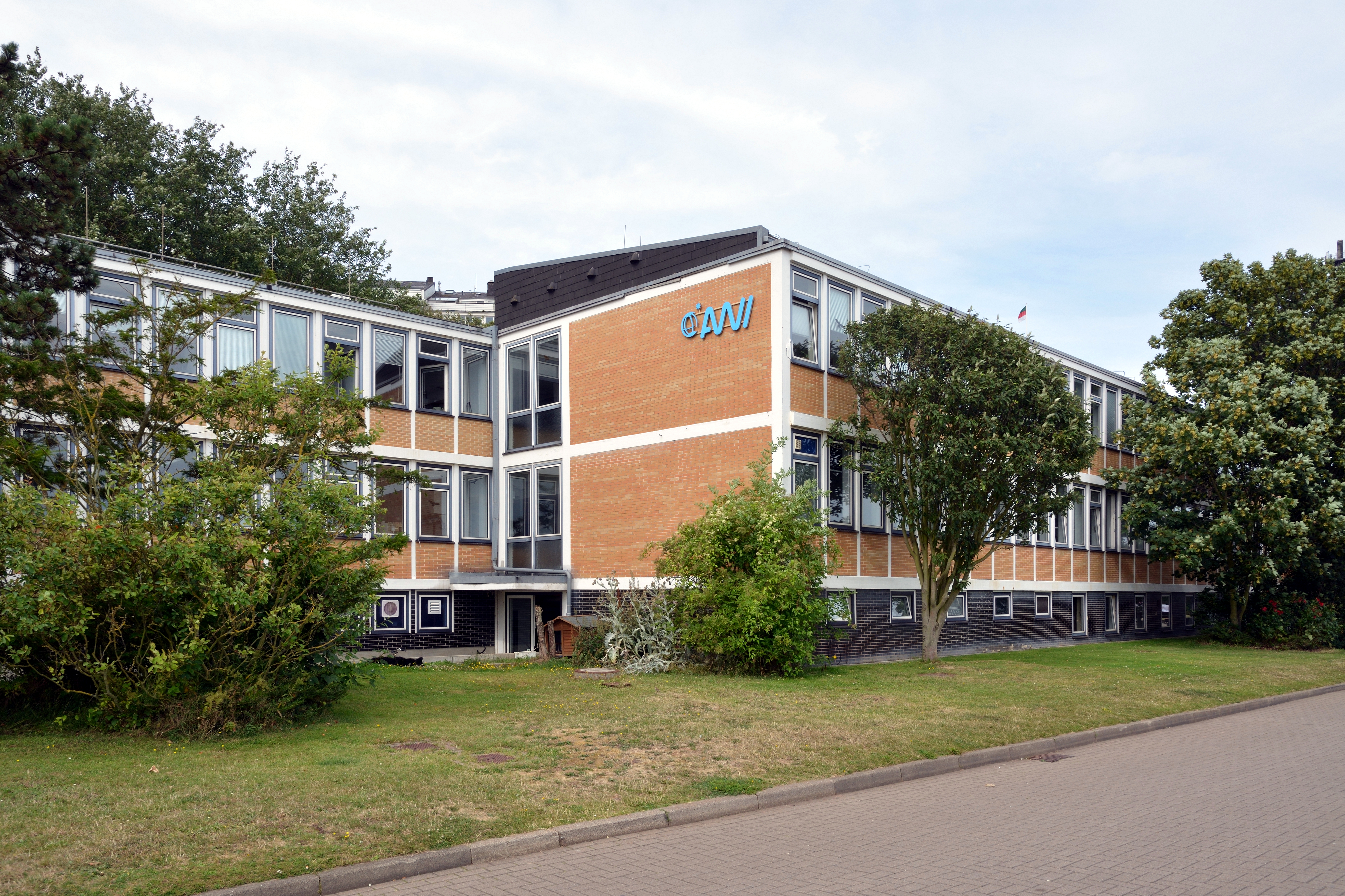 Bilder von Helgoland im Juli 2019Das Alfred-Wegner-Institut auf Helgoland